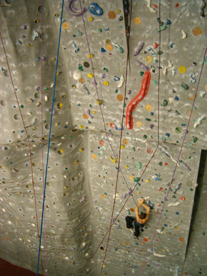 Eigen foto. Zicht indoor klimzaal